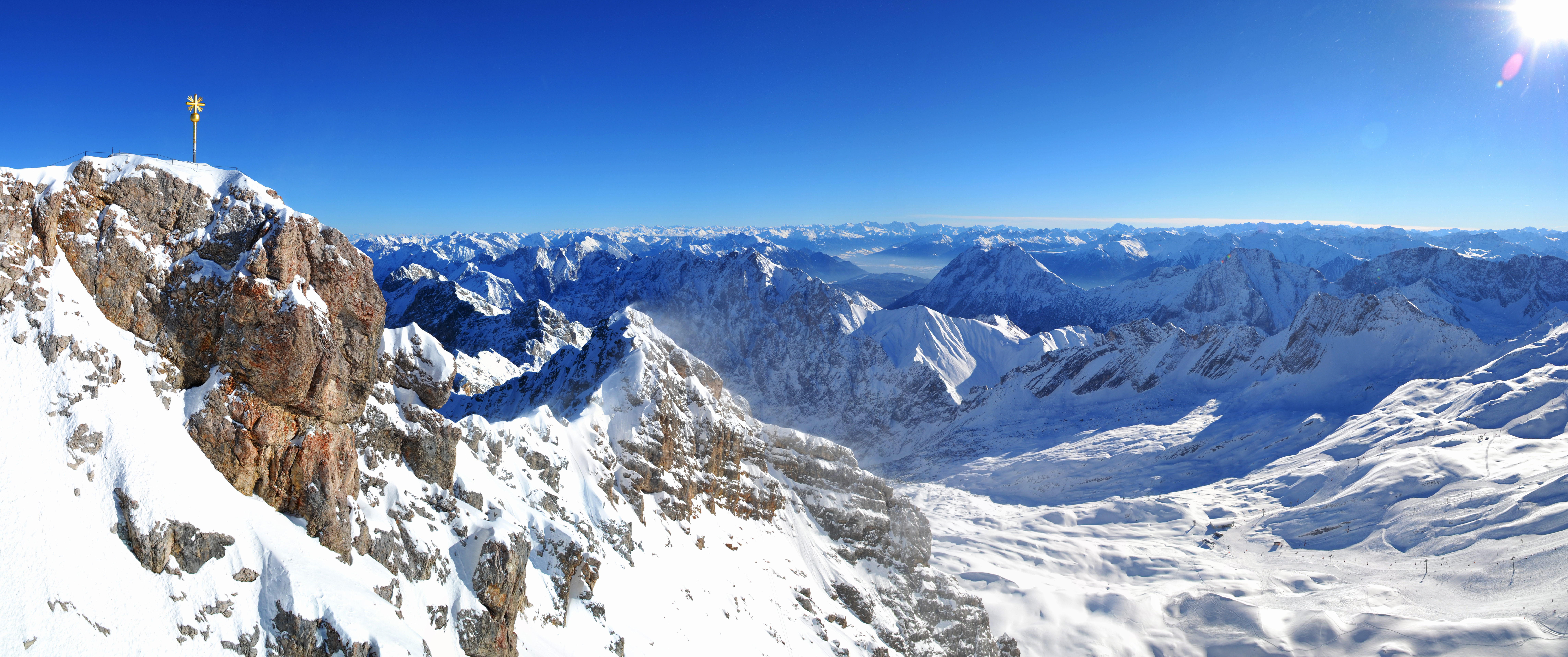 panorámakép a Zugspitze csúcsáról